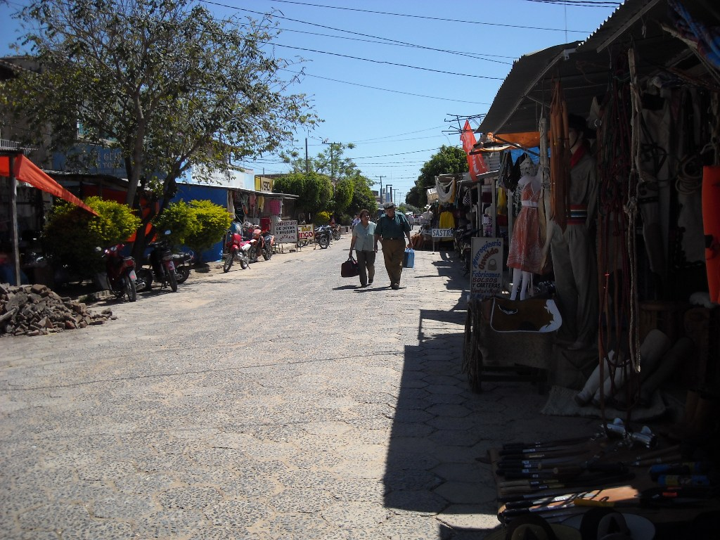 Vista de las calles de Alberdi.